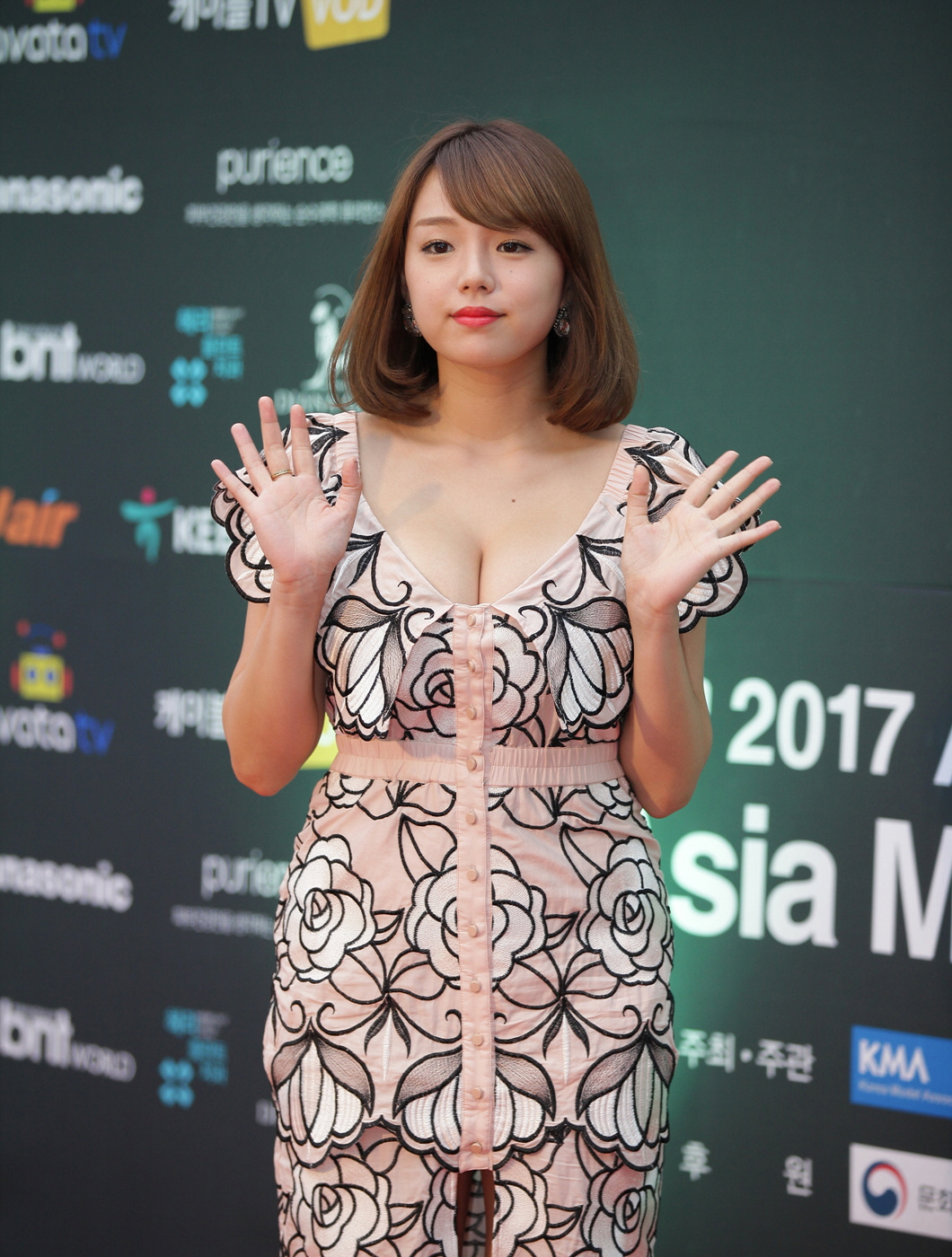 시노자키 아이(Shinozaki Ai) 2017 아시아 모델 페스티벌 레드카펫